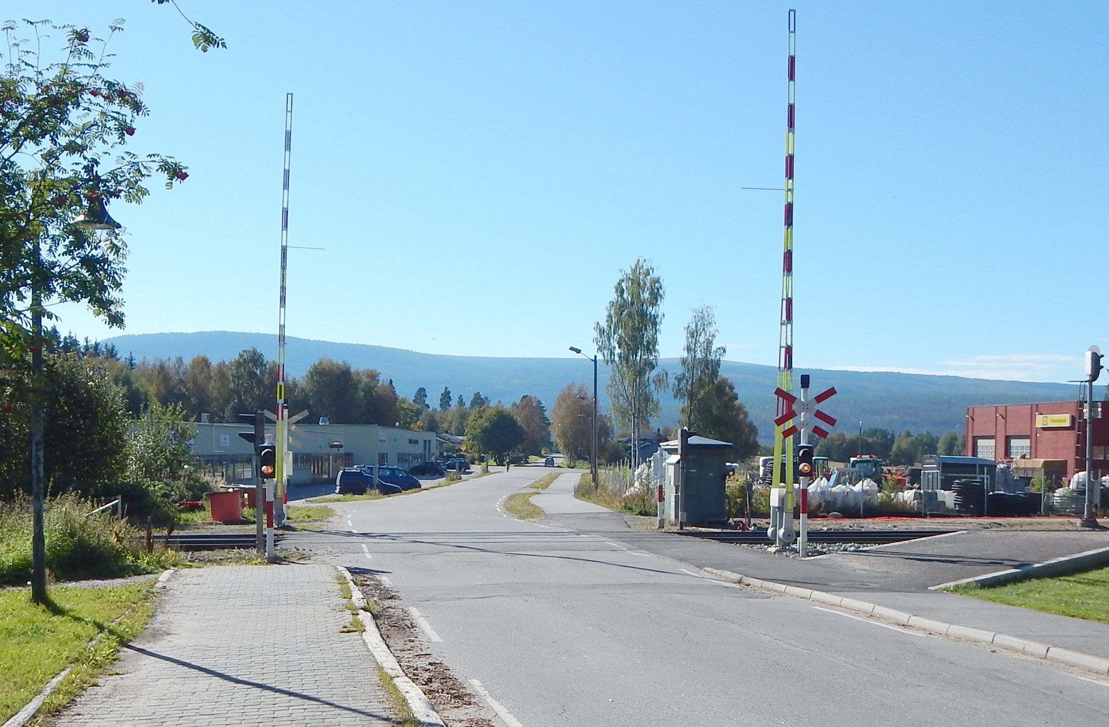 Sundfloveien (fylkesvei 632) krysser Rørosbanen på planovergang på Koppang.